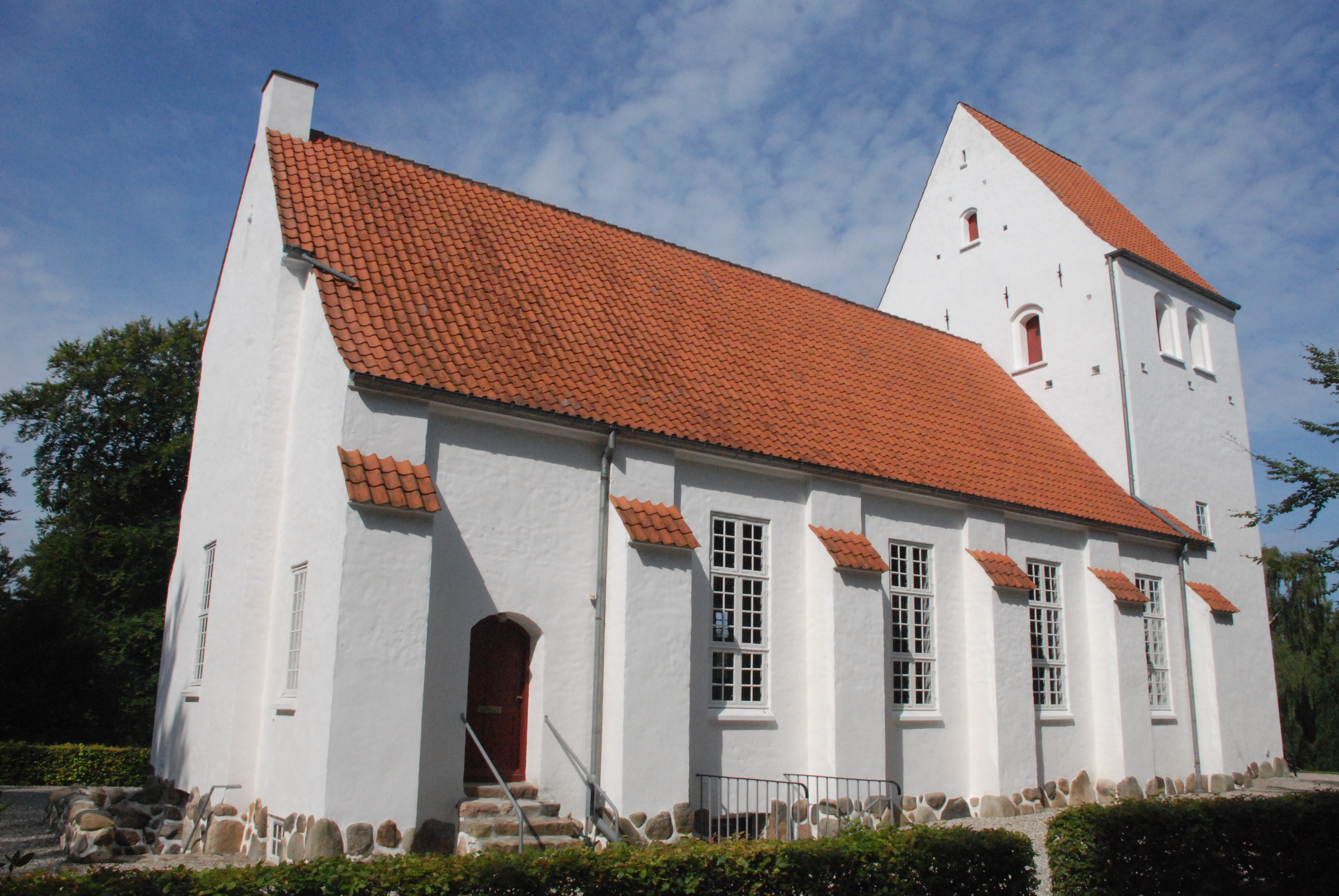 Gurre Kirke, Gurre Sogn, Lynge-Kronborg Herred, Frederiksborg Amt, Danmark.